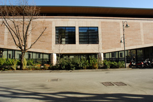 Facoltà di Giurisprudenza - Università degli Studi di Trento